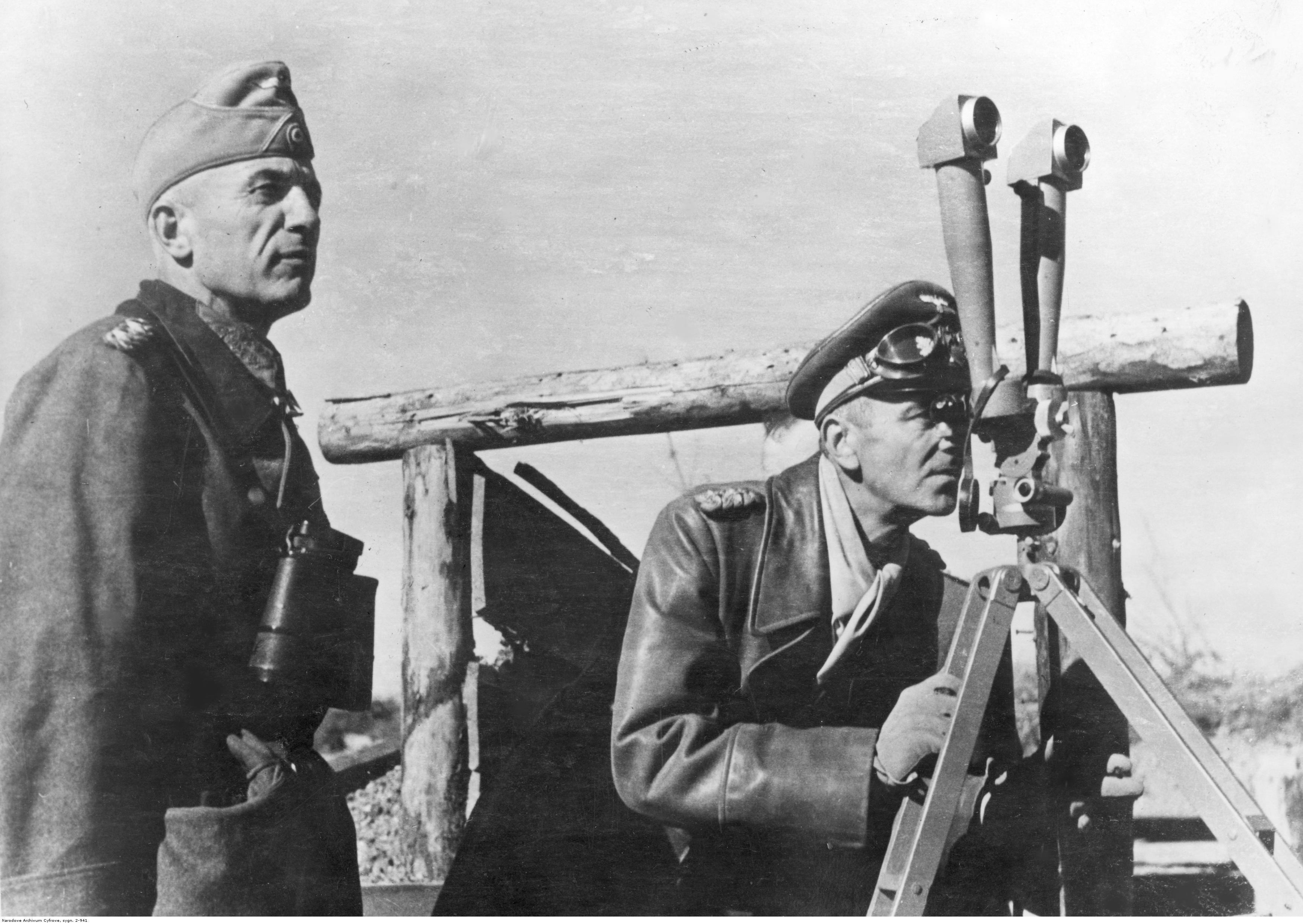 Gen. Friedrich Paulus obserwuje przez lornetę nożycową Scherenfernrohr SF09 sytuację na froncie. Obok niego gen. Hermann Hoth.